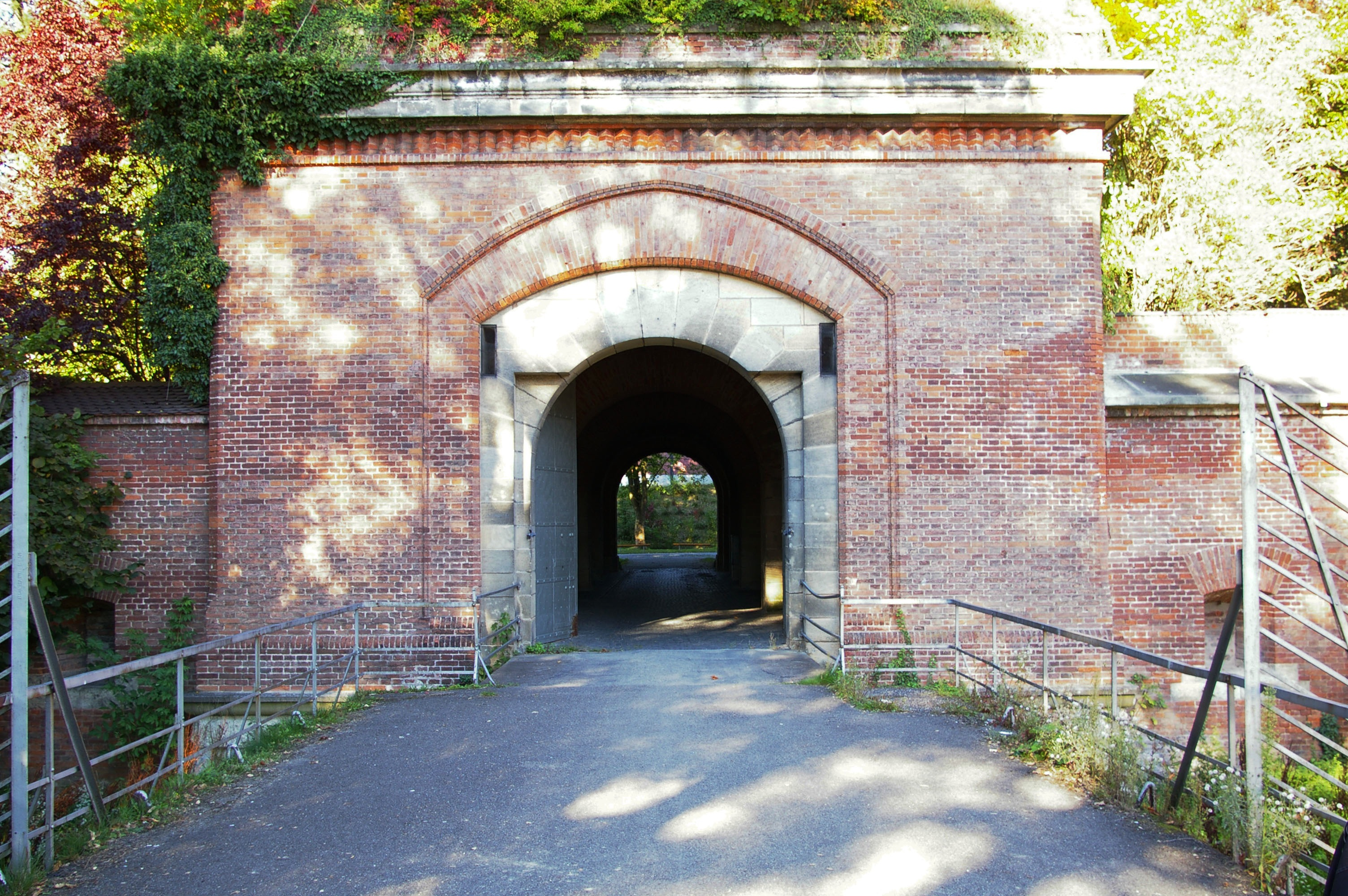 Memminger Tor